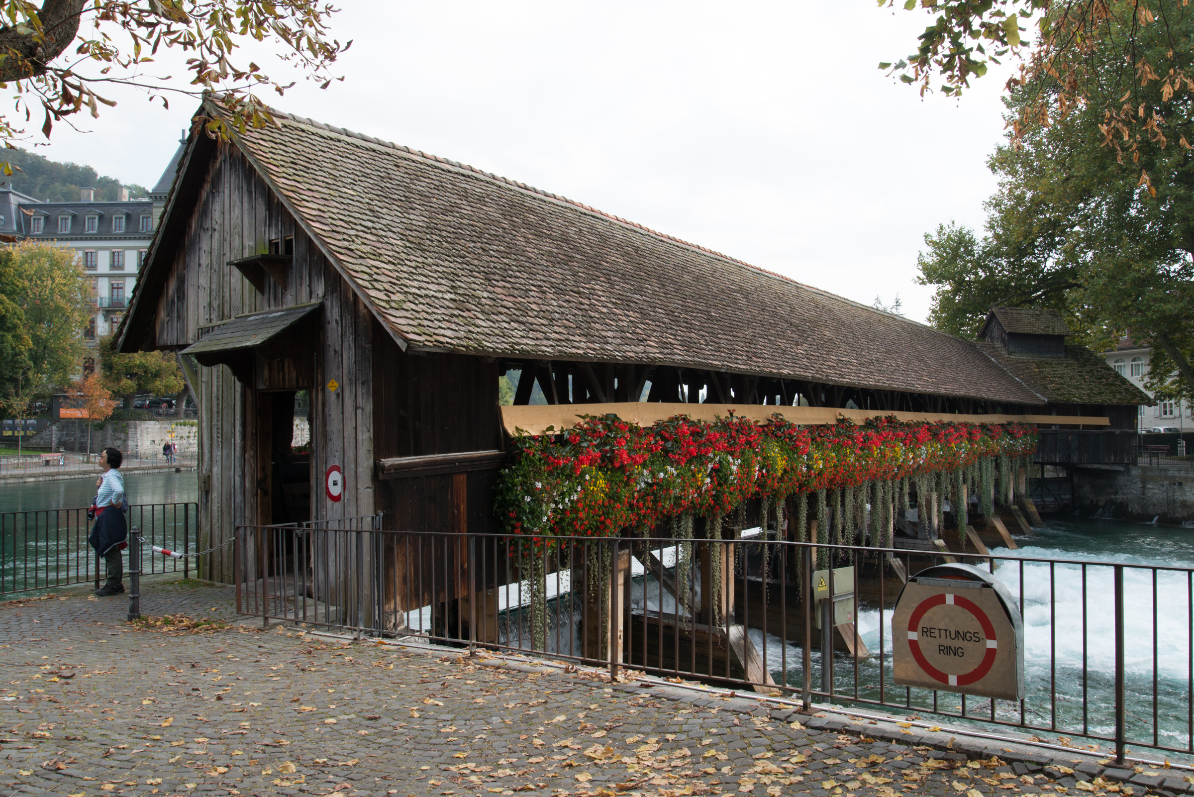 Obere Aareschleuse Thun, Zugang Nord